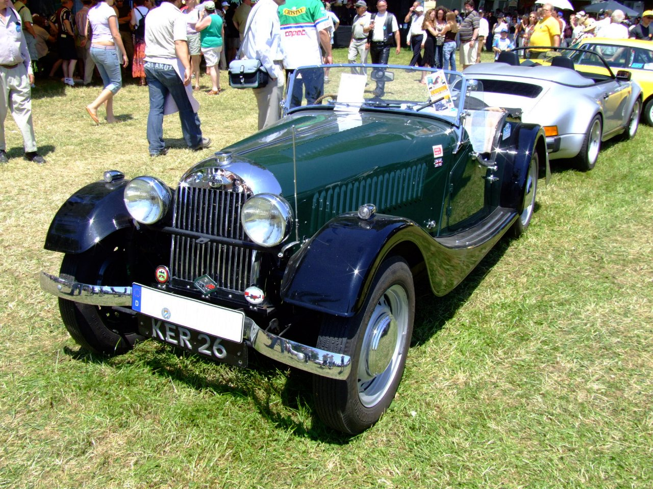 Summary Quelle: selbst fotografiert, 06/2006 Fotograf: Späth Chr. Baujahr: 1952 100 PS